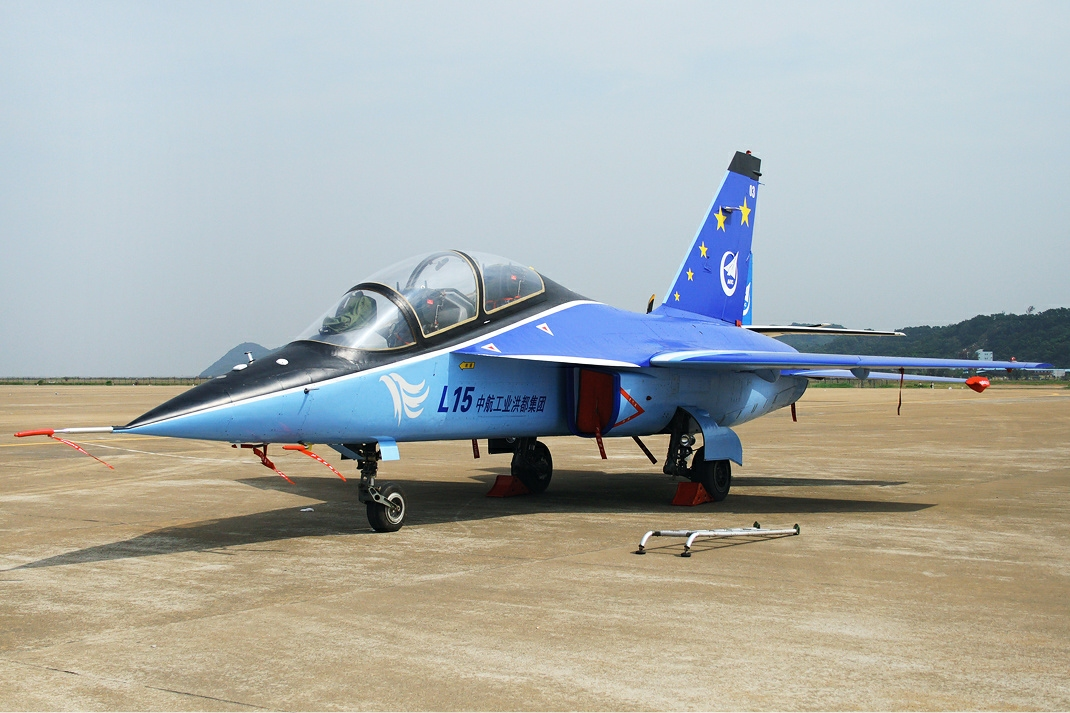 PLAAF Hongdu L-15 Falcon